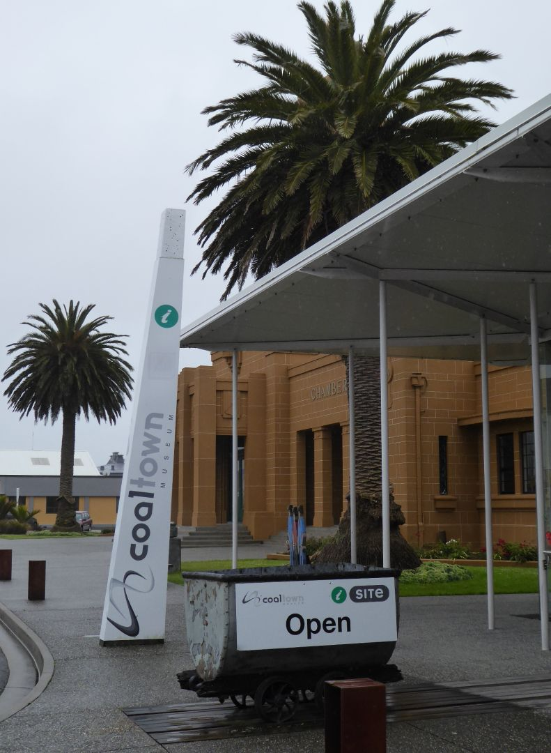 Kohelmuseum und Touristeninfo in Westport (NZ)